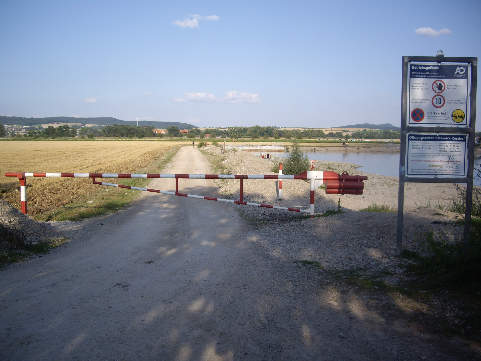 Rosdorfer Baggersee bei Göttingen, Schrankenanlage von 2014 mit Verbotsbeschilderung am Nordwestufer. Blick nach Osten auf Reinshof, am linken Bildrand Göttingen, 31.7.2014. Foto: F. Welter-Schultes.